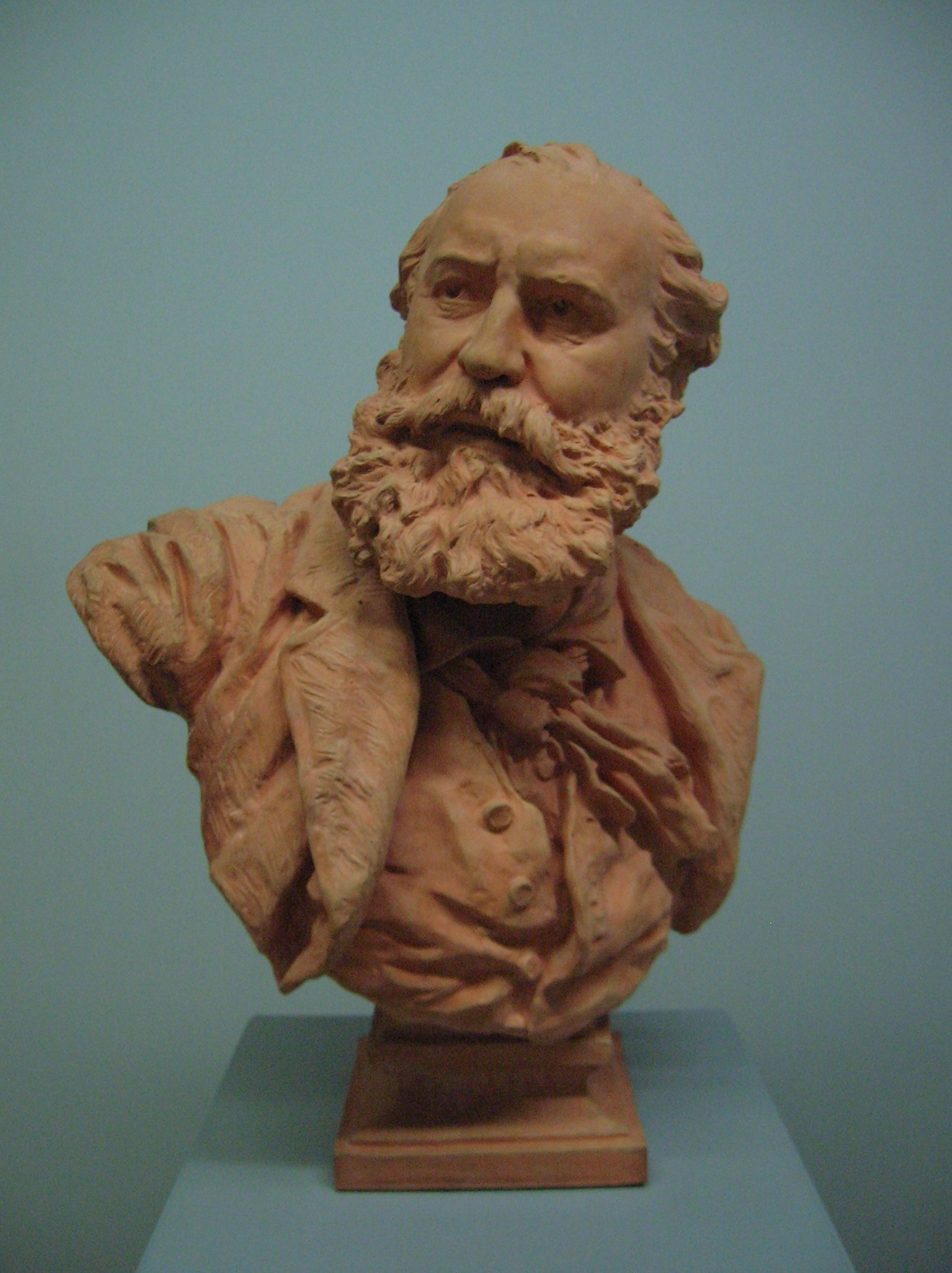 Buste de Charles Gounod, 1873 réalisé par Jean-Baptiste Carpeaux (Valenciennes 1827-Courbevoie 1875). Terre cuite, 1873, Musée Hebert à La Tronche. Prix de Rome de sculpture en 1854, modèle en 1873, à Londres où Charles Gounod (1819-1893), ami de Carpeaux et Hébert, donnait des concerts.